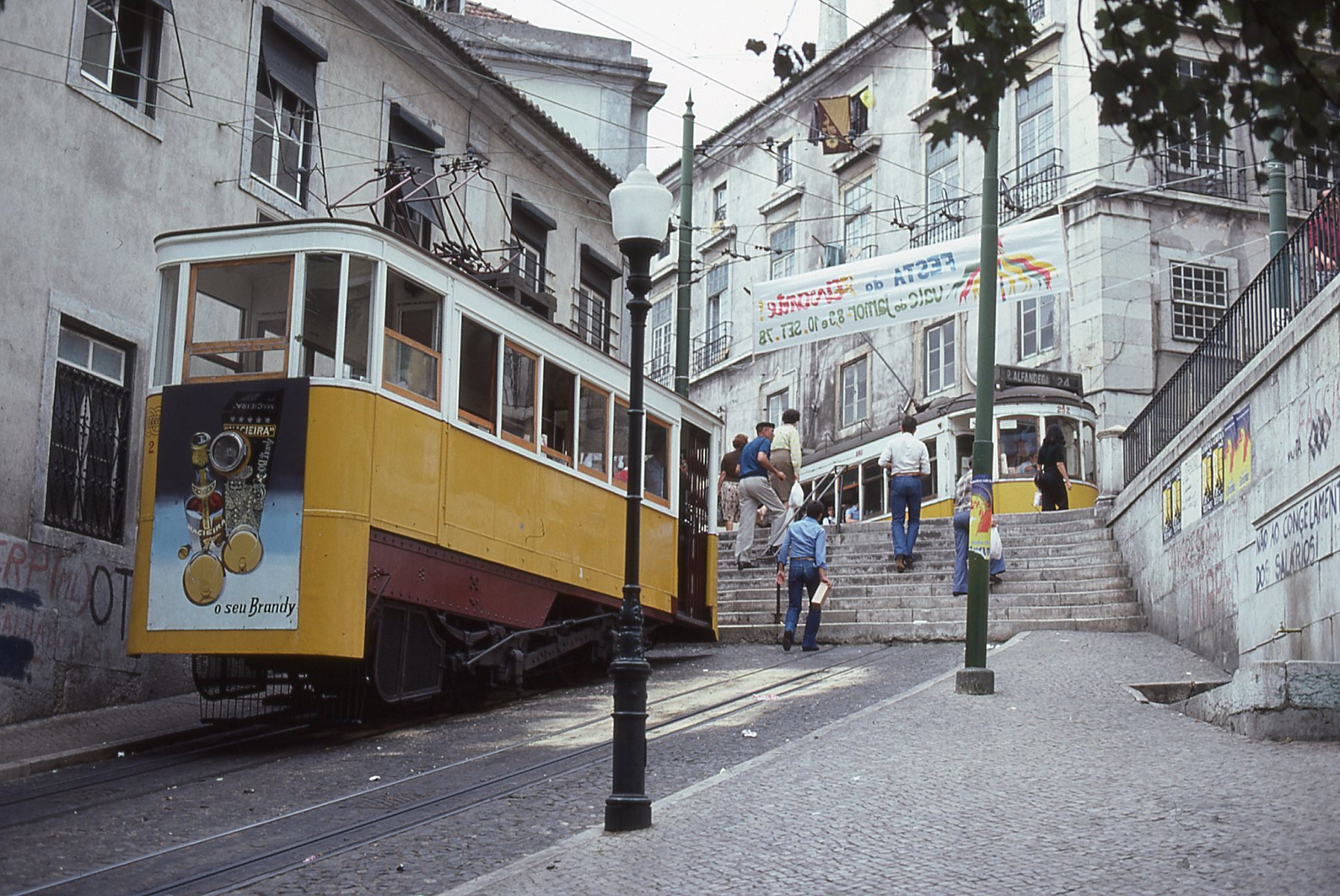 Trams funiculaire de Lisbonne DA GLORIA en 1977 (ce funiculaire existe encore à ce jour, mais pas le tram de la ligne de tram 24)